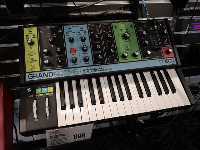 Moog Grandmother スプリングリバーブがヤバい。モジュレーションとかできぴきぴした音を作ってディケイ短めで適当にシーケンス回しながらリバーブ量を上げていくと、トリップしてしまう。口は半開きになり、シャツは汗で濡れていた。かなりヤバい。買ってしまわないように気をつける。 Grandmother